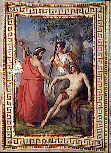 Esculape rend la vie à Hippolyte